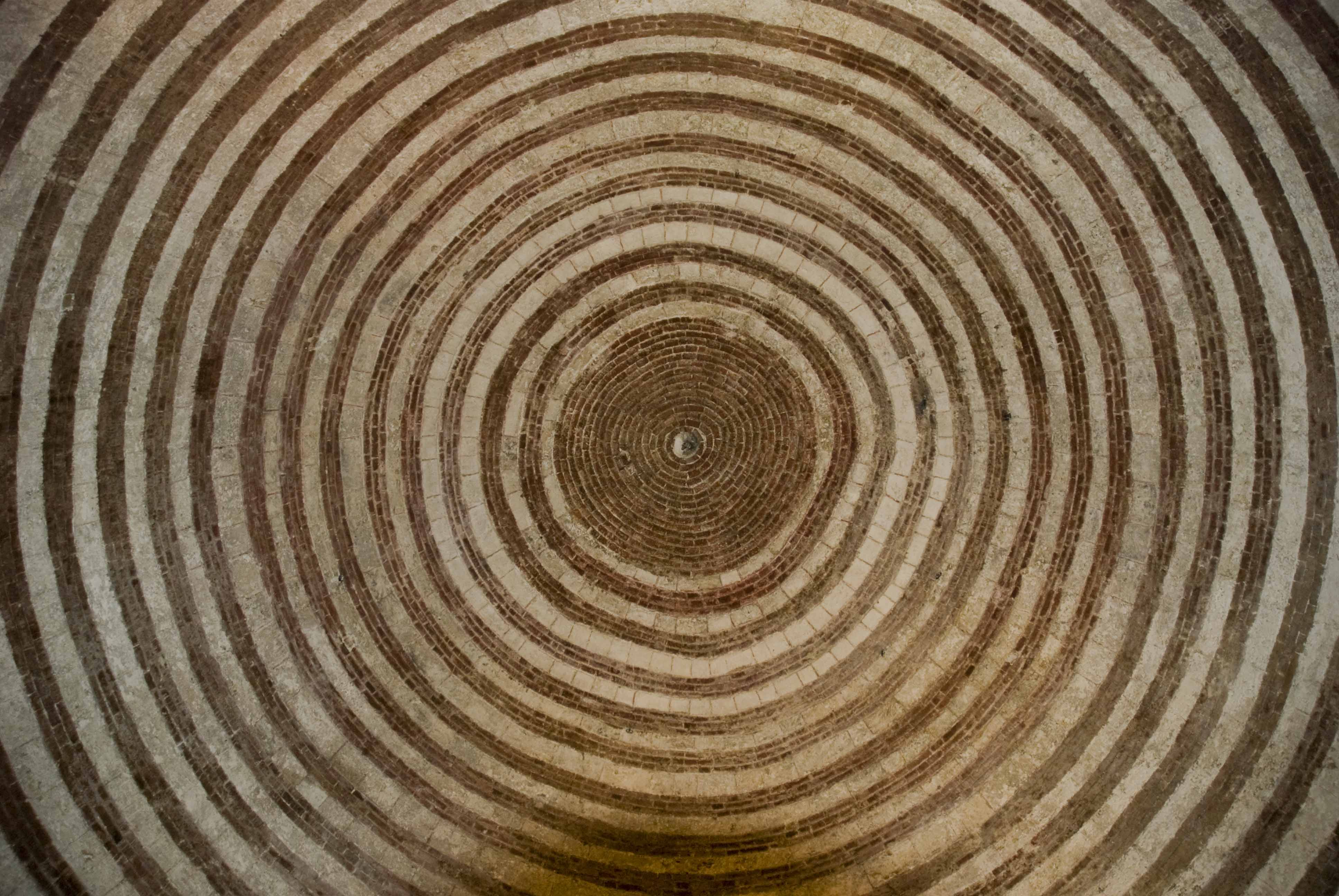 cupola dell'eremo di montesiepi (chiusdino)